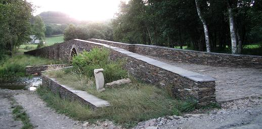 A Ponte de Saa, no concello de Vilalba. Camiño Norte de Santiago, pk 102. Sobre o río Labrada, ten dous arcos en xisto. Ten nove aliviadoiros para epocas de enchente. Tomada por user:Agremon o 08/07/05 Uploaded by User:Agremon